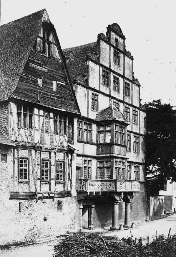 Das 1885 niedergelegte alte Hilchenhaus neben dem "neuen" Hilchenhaus in Lorch / Rhein